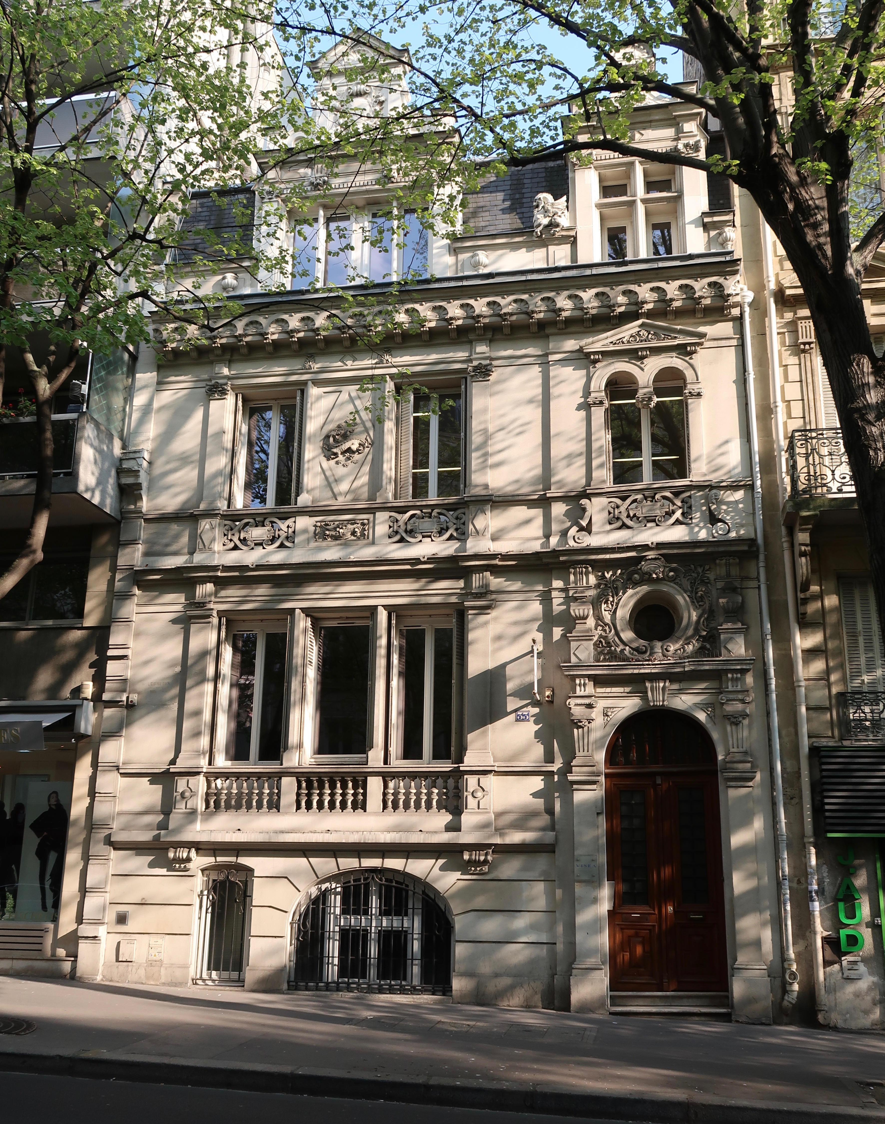 33 avenue Mozart (Paris, 16e).